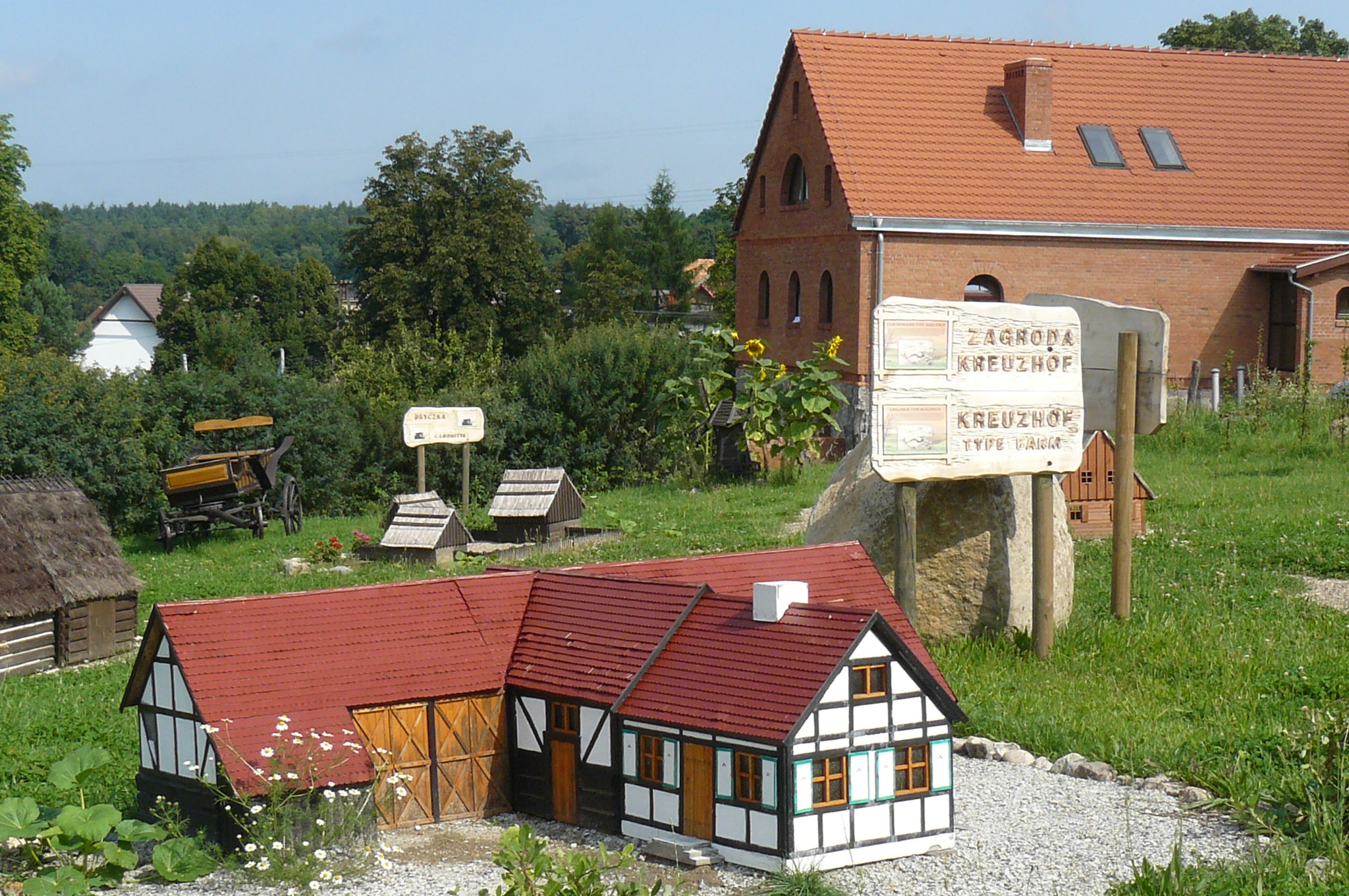 Prusim, skansen Olandia.